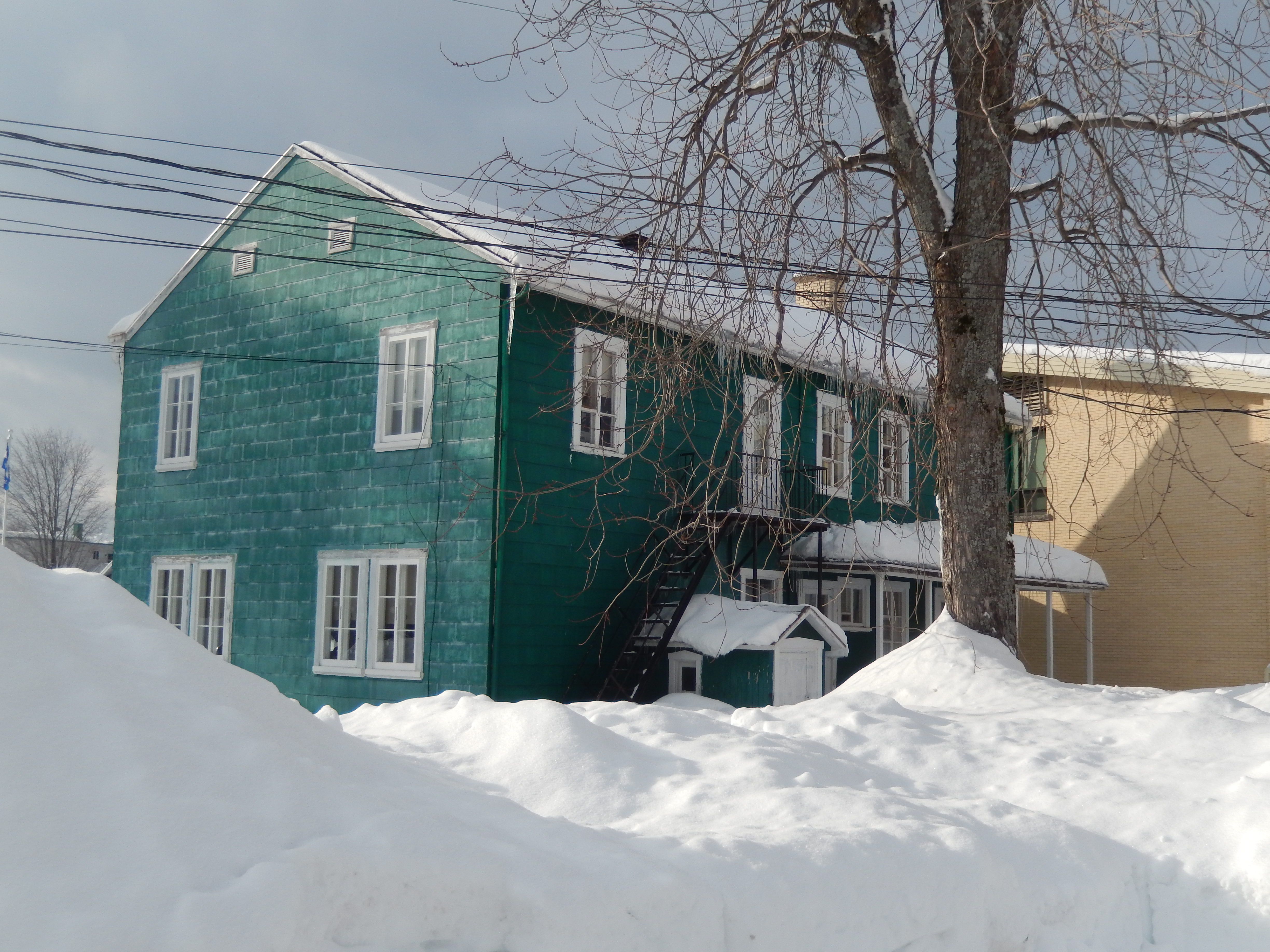 Ancien couvent de Saint-Léonard en janvier 2020.